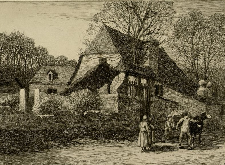 Coin de village